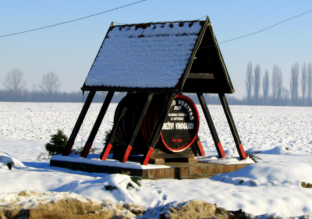 Улазак у Кнежеви Винограде Аутор: Бранко Д. Тодоровић